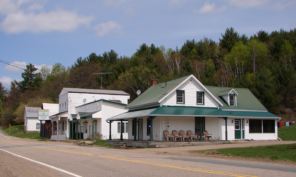 Sheenboro, Quebec, Canada